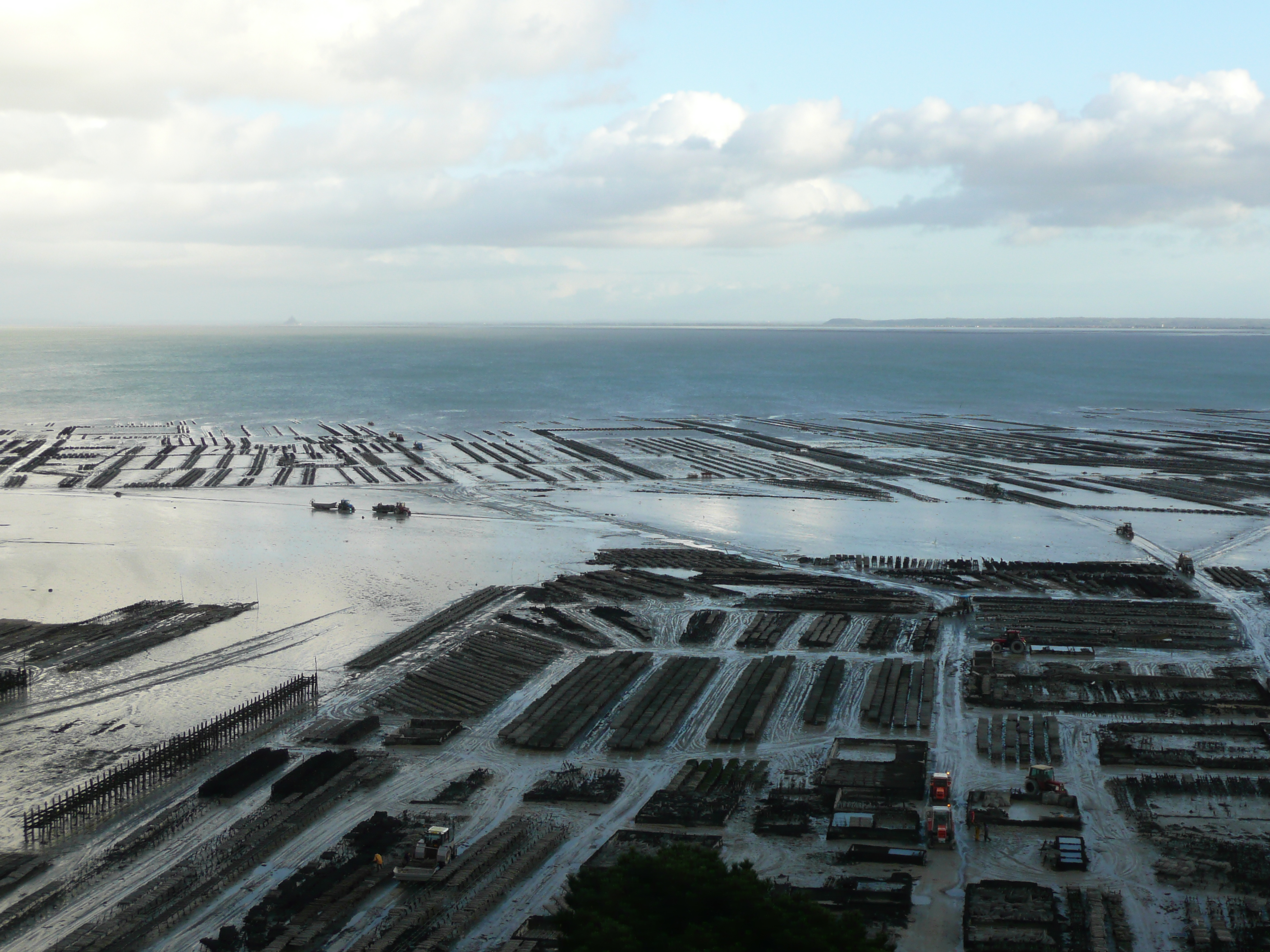 Parcs à huîtres de Cancale depuis les hauteurs. On peut apercevoir le Mont Saint Michel à l'horizon.